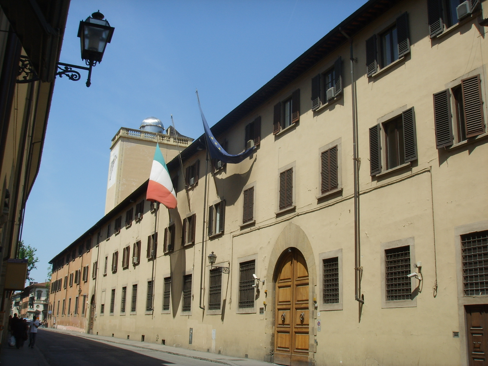 see description